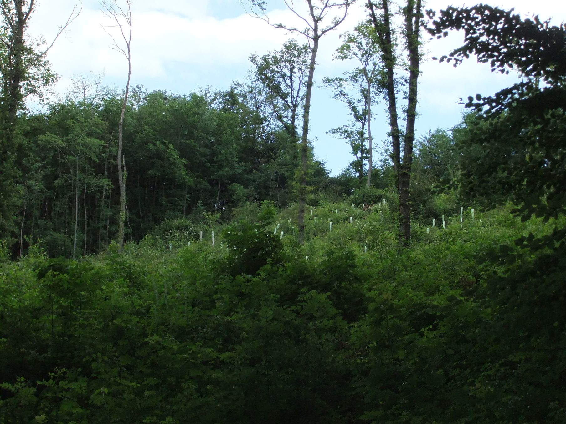 Mittelwaldwirtschaft im Bielefelder Stadtwald.